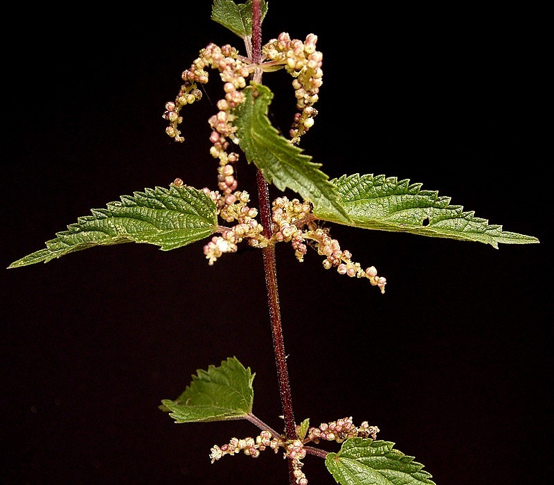 Urtica dioica